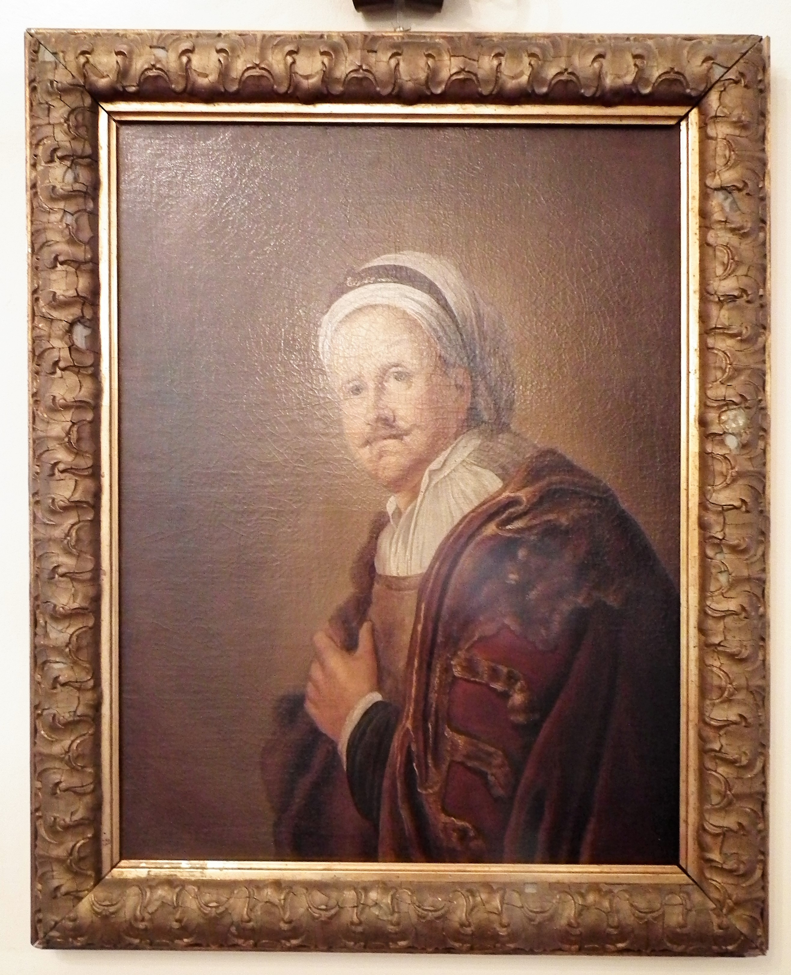 Daniło I Šćepčević zwany również Petrowiczem z plemienia Njeguši (Muzeum, Grudziądz). Autor NN, koniec XIX wieku.